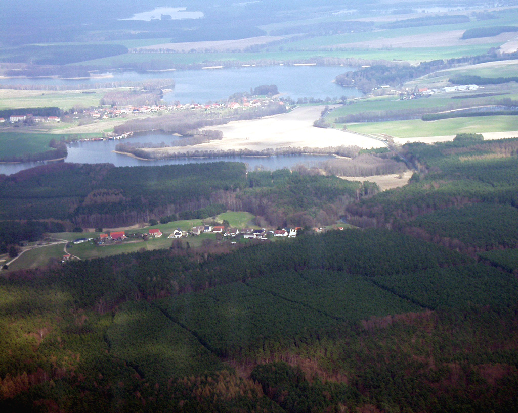 Zu sehen ist das Mecklenburgische Dorf Neu Canow. Im Hintergrund findet man den Klenzsee, Wustrow und den Plätlinsee.